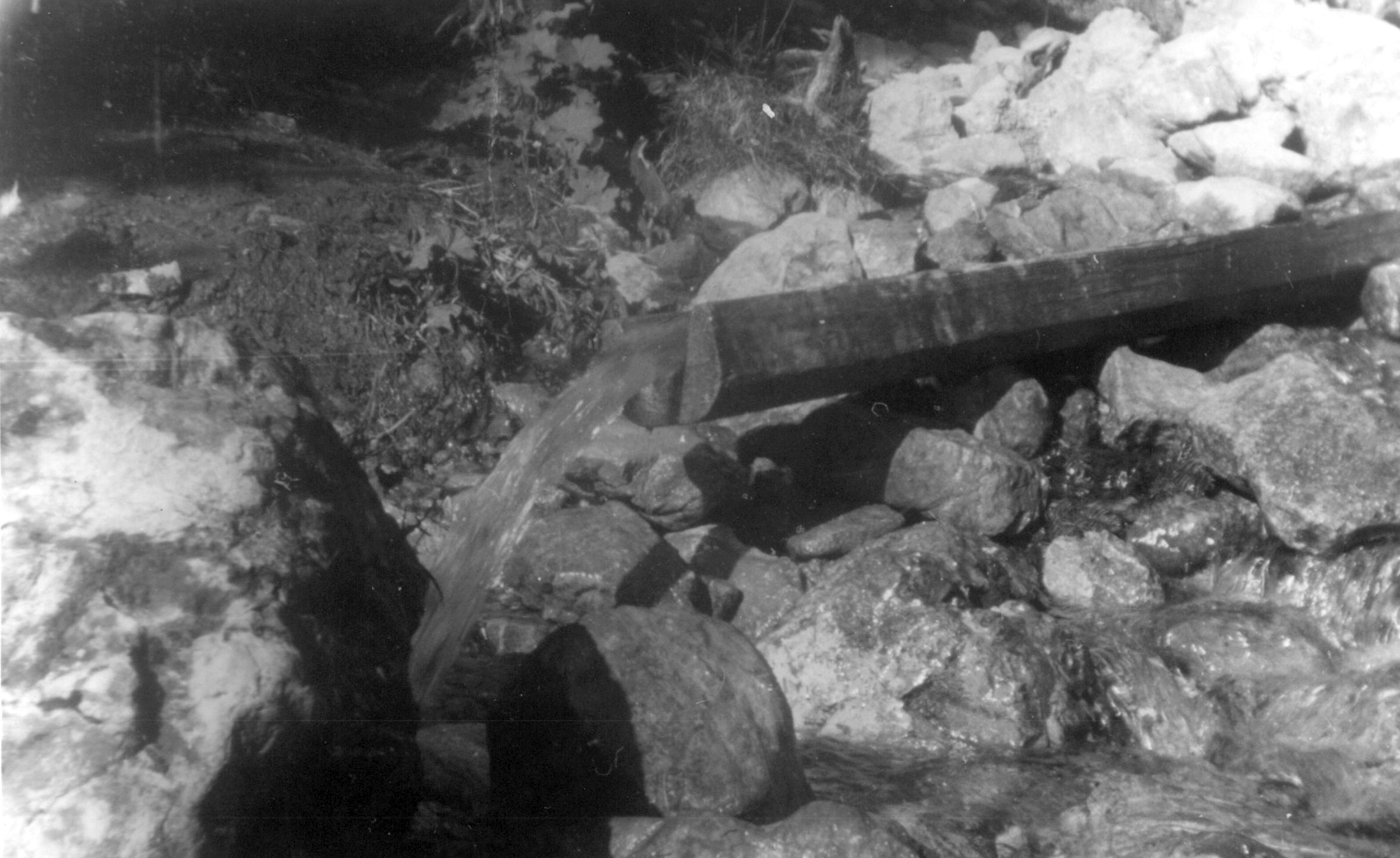 Ujęcie wody ze Złotego Potoku – zdjęcie z 1976 r.